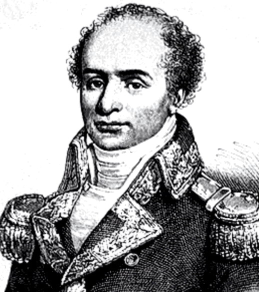 General Louis Joseph Baron de Vichery 1817, General in den napoleonischen Kriegen